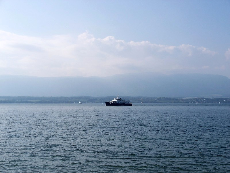 Le bateau arrive à Chens